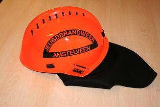 Een jeugdbrandweer helm